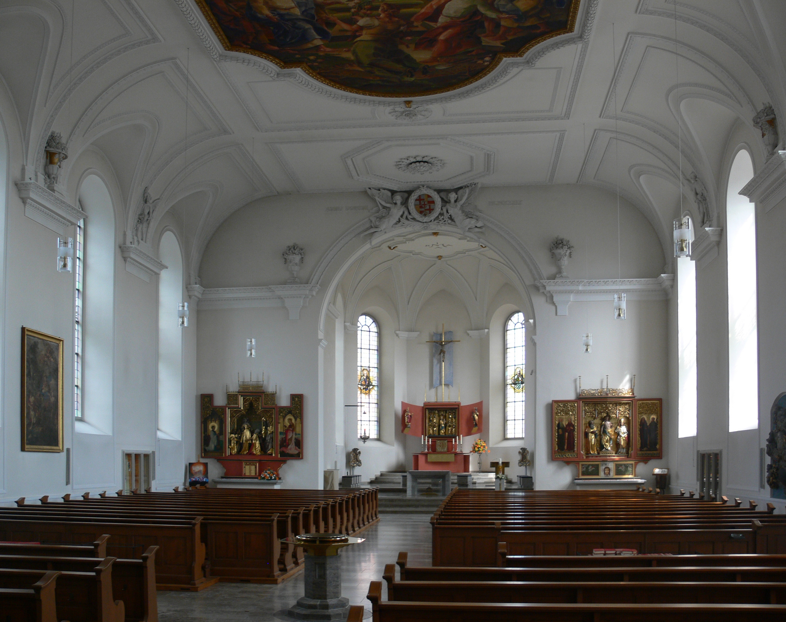 Kath. Pfarrkirche Mariä Heimsuchung, Meersburg (Bodenseekreis) Innenansicht